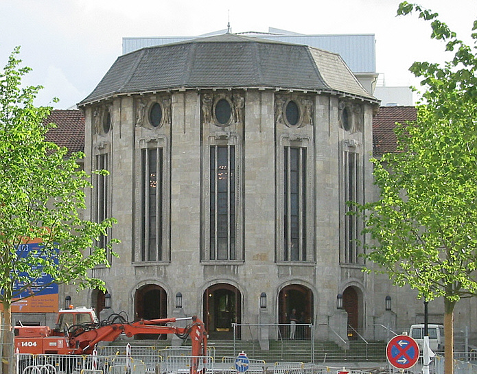 Bremerhaven, Germany: Stadttheater (municipal theatre) Das abgebildete Objekt ist ein geschütztes Kulturdenkmal in der Freien Hansestadt Bremen, mit der Nr. 1552 beim Landesamt für Denkmalpflege registriert.